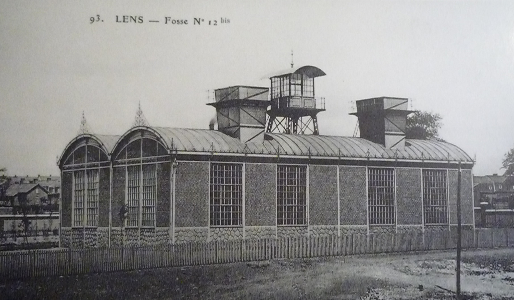 La fosse n° 12 bis de la Compagnie des mines de Lens était un charbonnage constitué d'un seul puits situé à Lens, Pas-de-Calais, Nord-Pas-de-Calais, France.